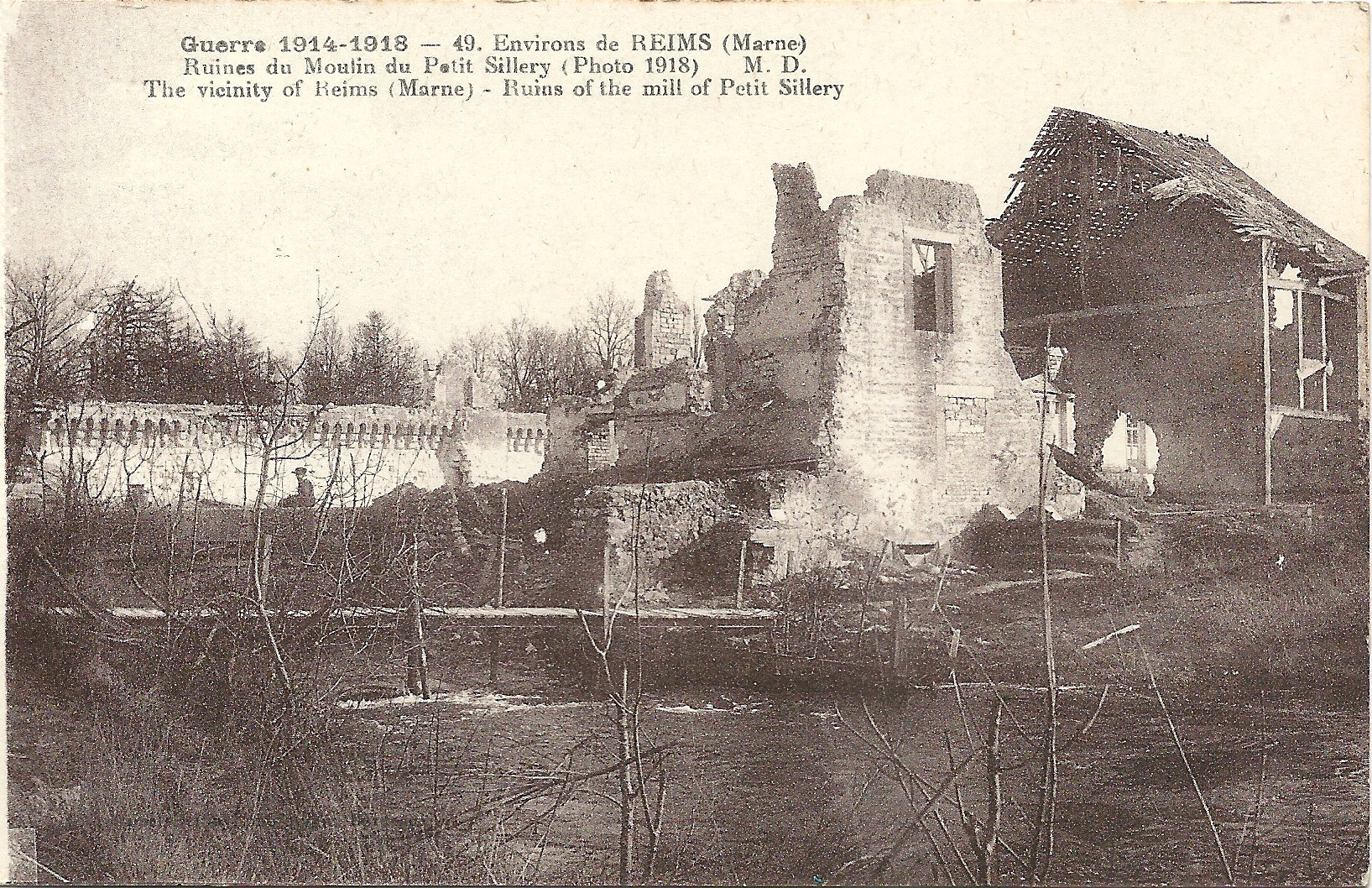 Cliché de 1918 qui montre l'état du pays autour de Reims après le départ des troupes allemandes en 1918.